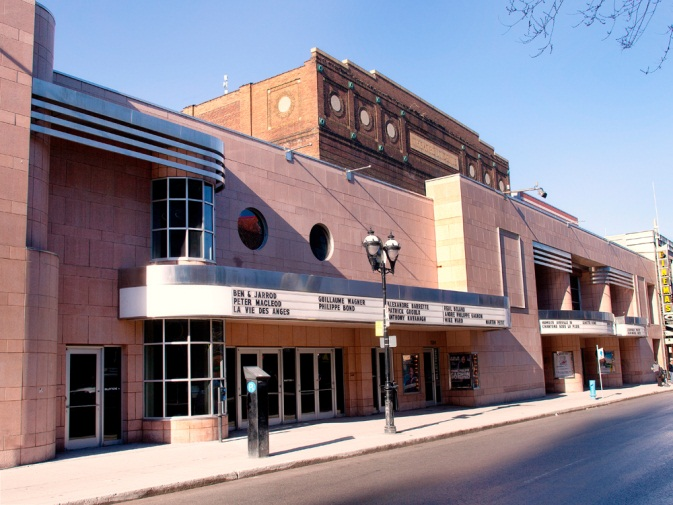 Théâtre St-Denis en 2012